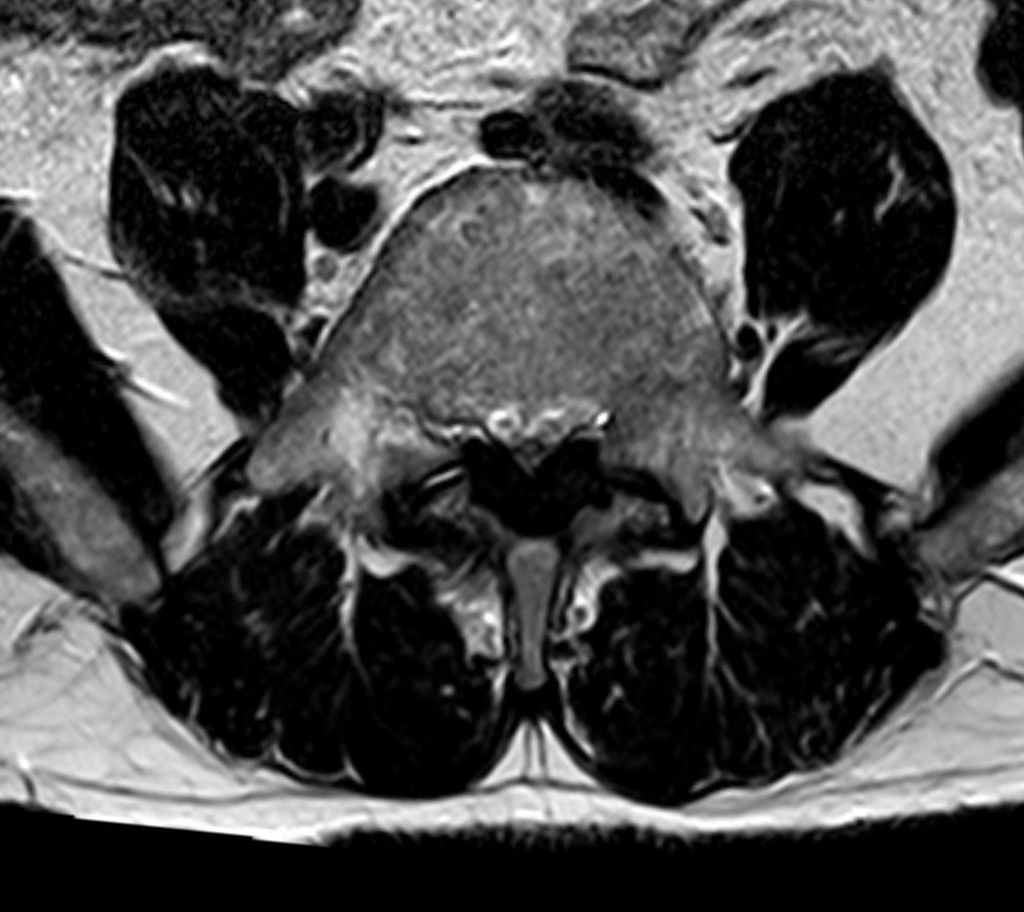 Hochgradige spinale Stenose auf Höhe LWK 5 bei erheblicher Hypertrophie der Ligamenta flava und Spondylarthrose. MRT T2w axial